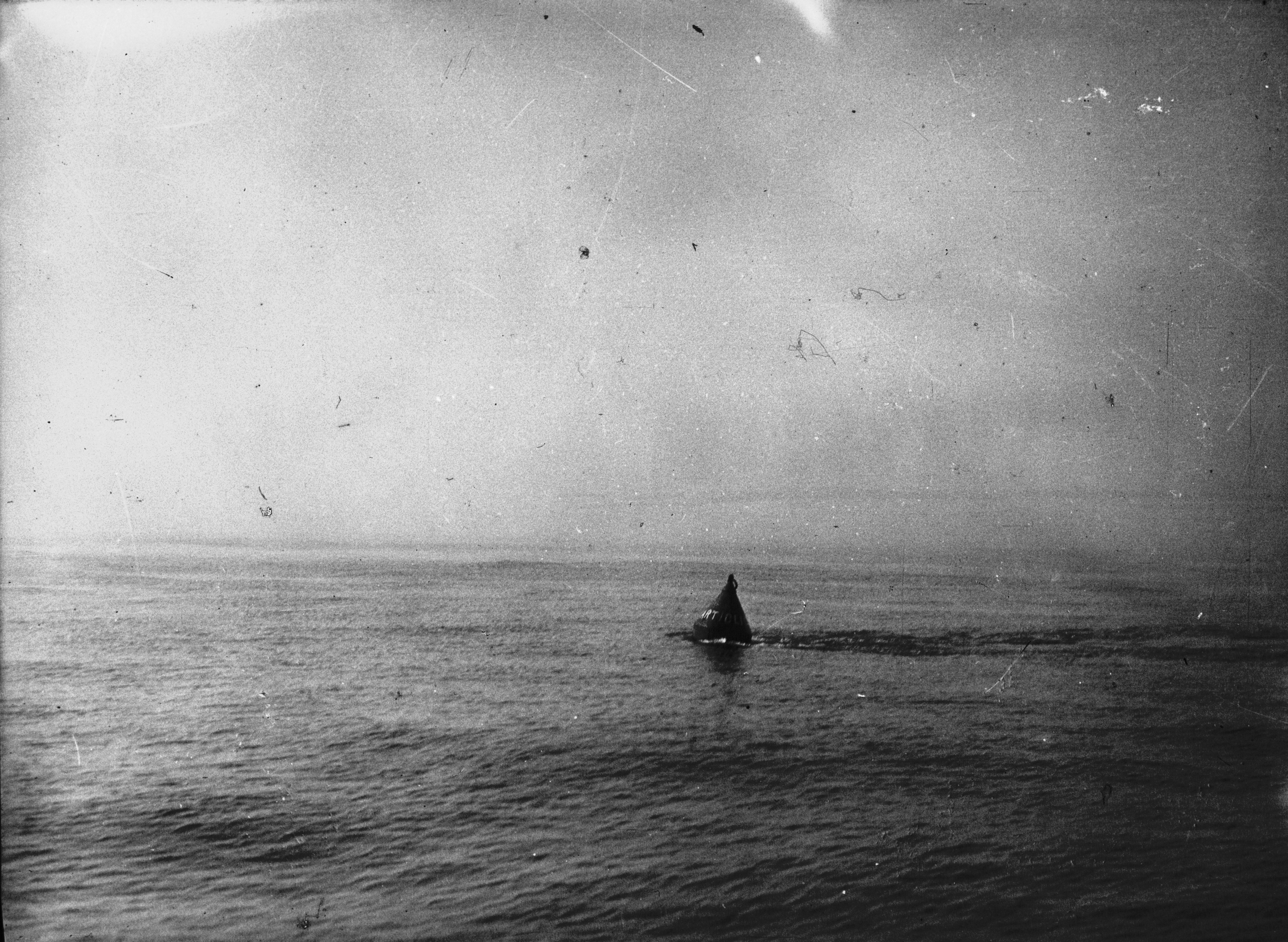 Bouée localisant l'épave du sous-marin Prométhée le 7 juillet 1932